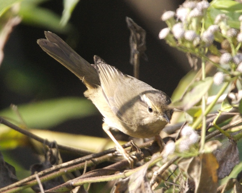 Radde's Warbler Phylloscopus schwarzi, Khao Yai, Thailand